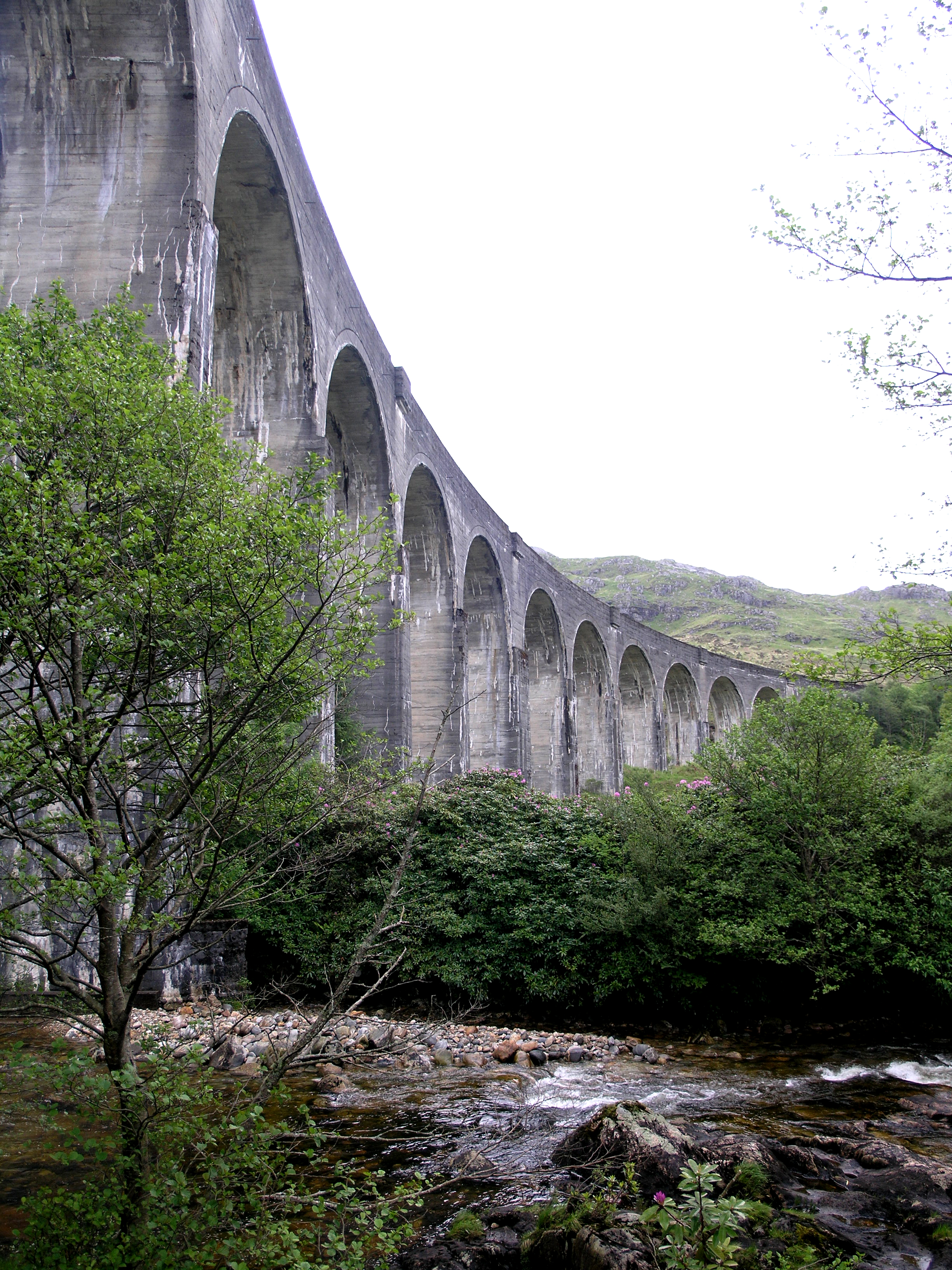 Glenfinnan Viaductglenfinnan viaduct